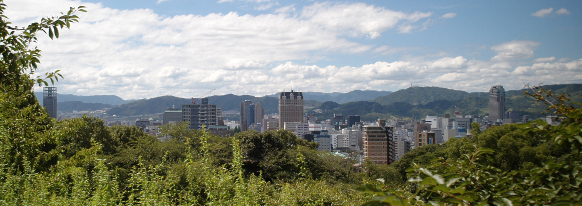 比治山から広島市内を望む